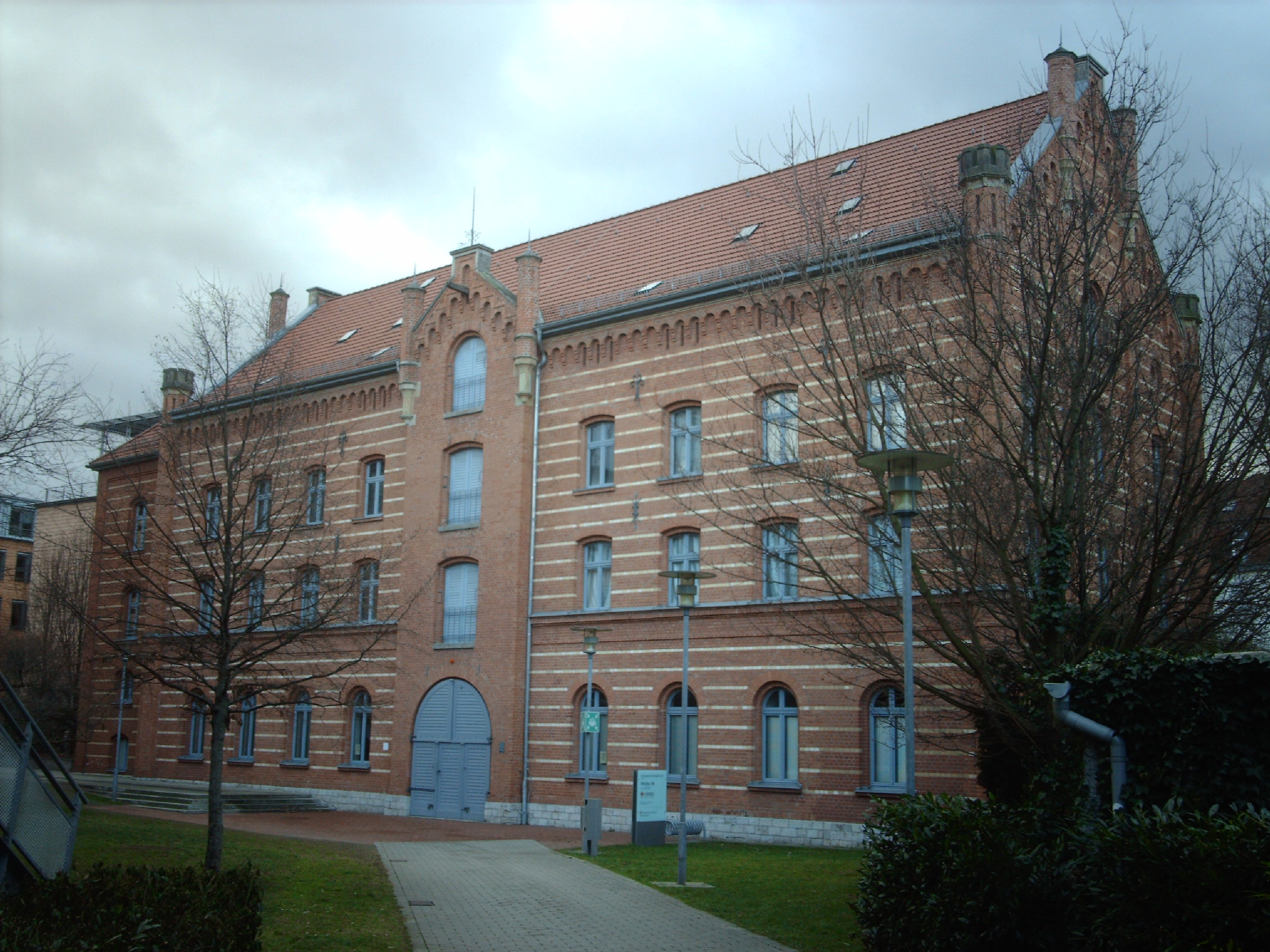 Druckereimuseum und Schaudepot im Benary-Speicher - Businessstraße, Erfurt, Thüringen, Deutschland.